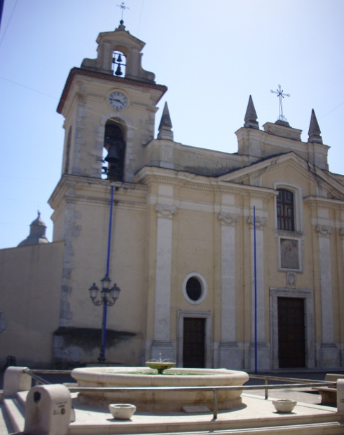 Facciata della Cattedrale di Alife con il campanile, e vista della fontana di piazza Vescovado.